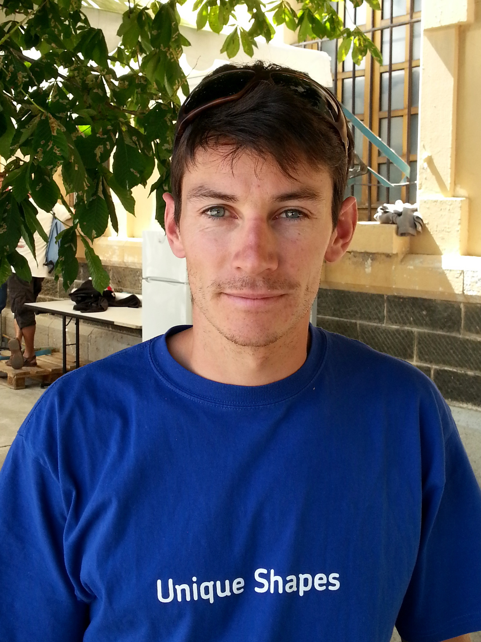 Manuel Romain en juillet 2012 à Briançon